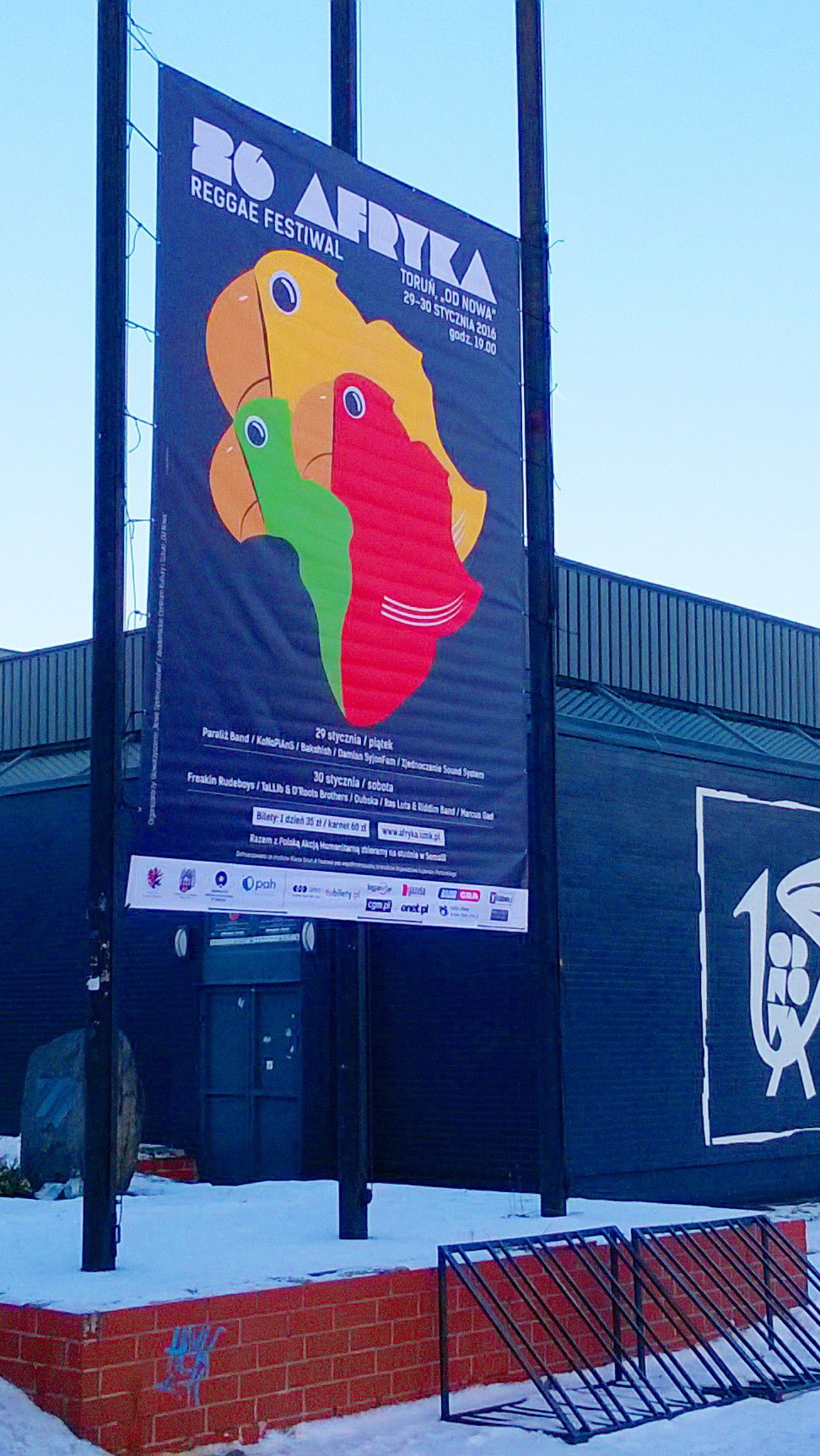 Afisz reklamujący Afryka Reggae Festival w Toruniu